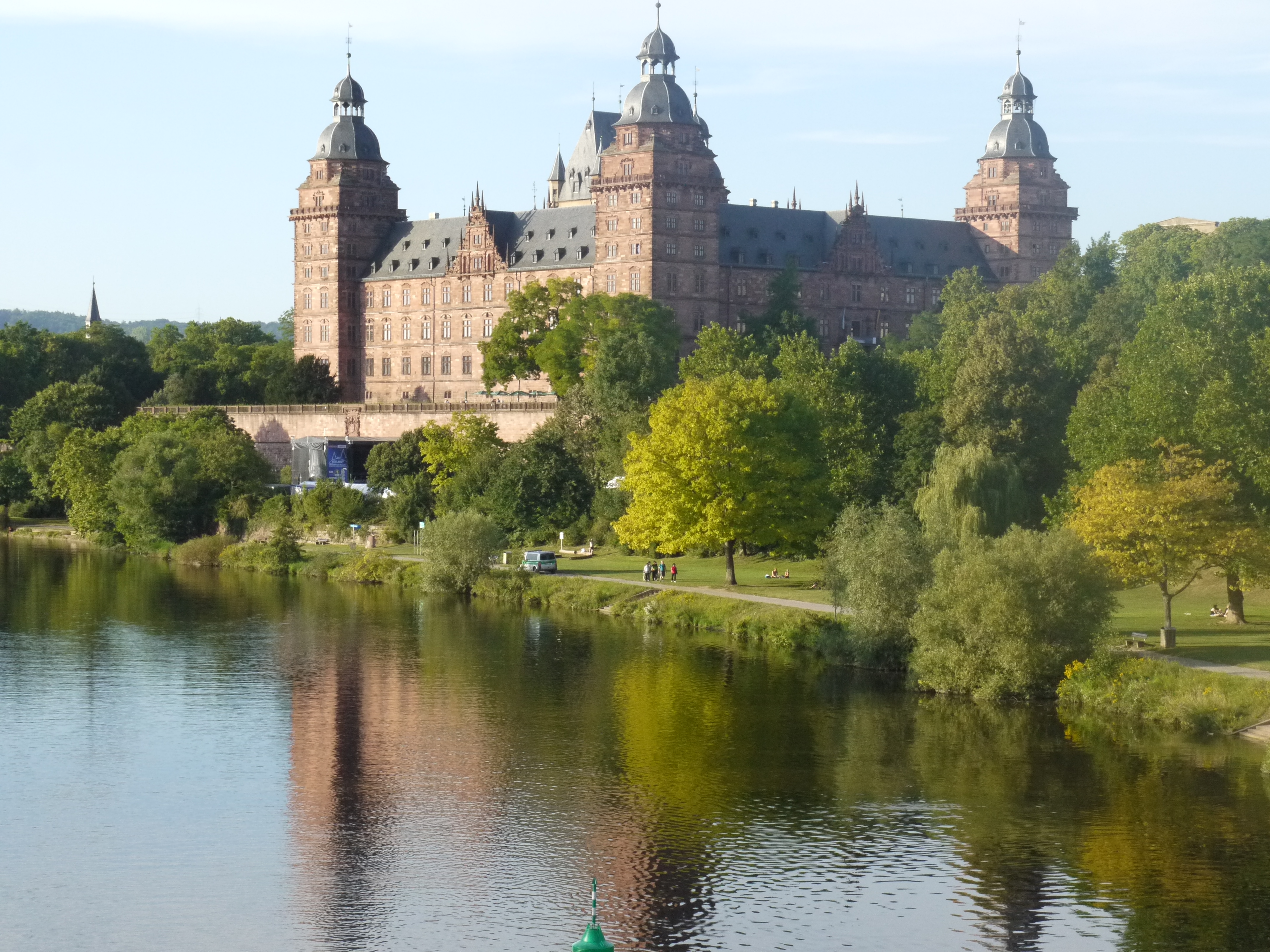 Schloss Johannisburg in Aschaffenburg